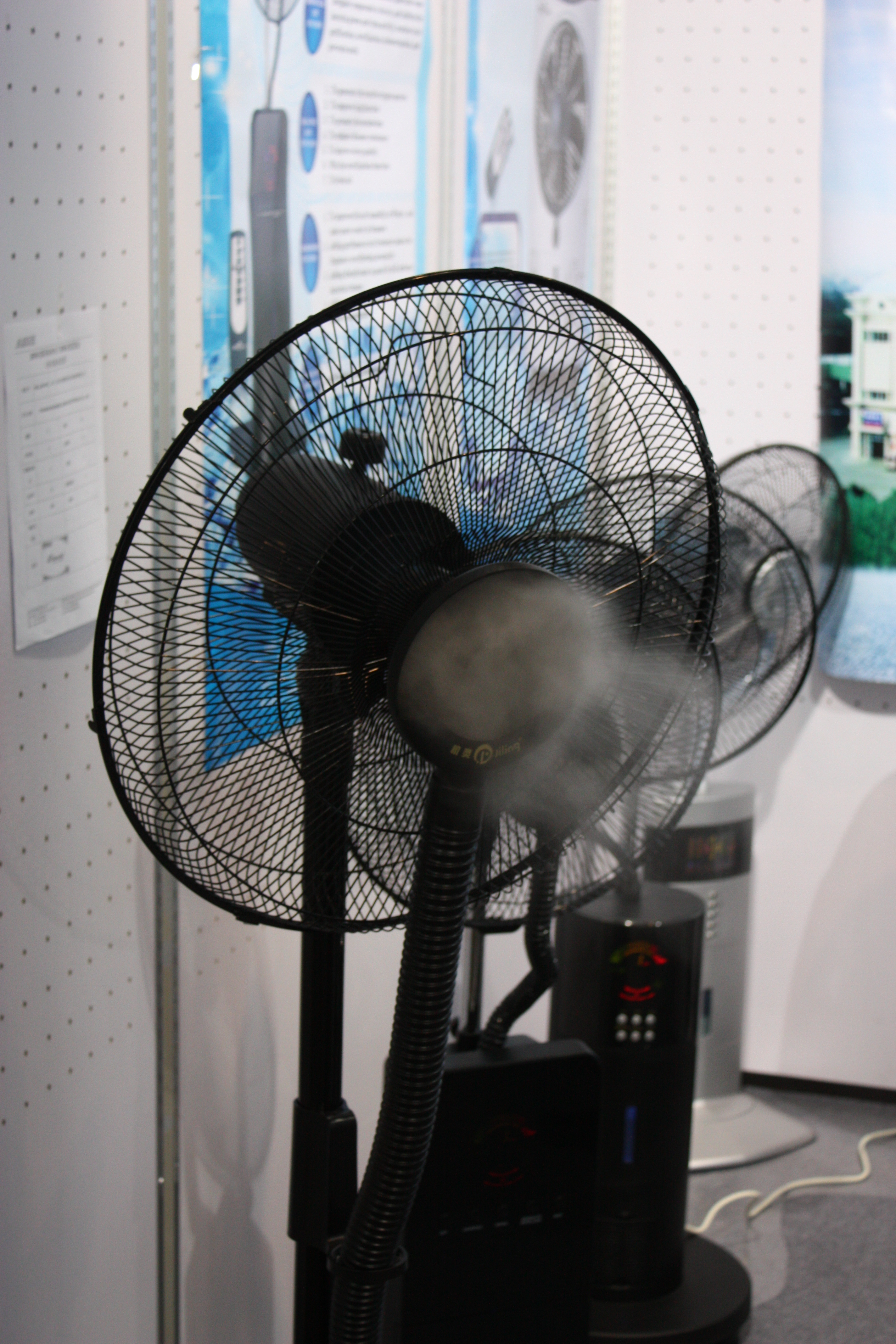 IFA 2010, Berlin; Ventilator mit Wasservernebelung - kühlt durch die Verdunstungswärme Ventilator mit Wassernebel zur Kühlung